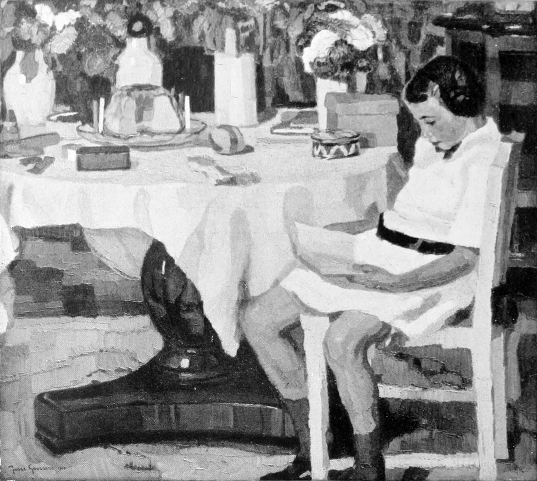 Anniversaire